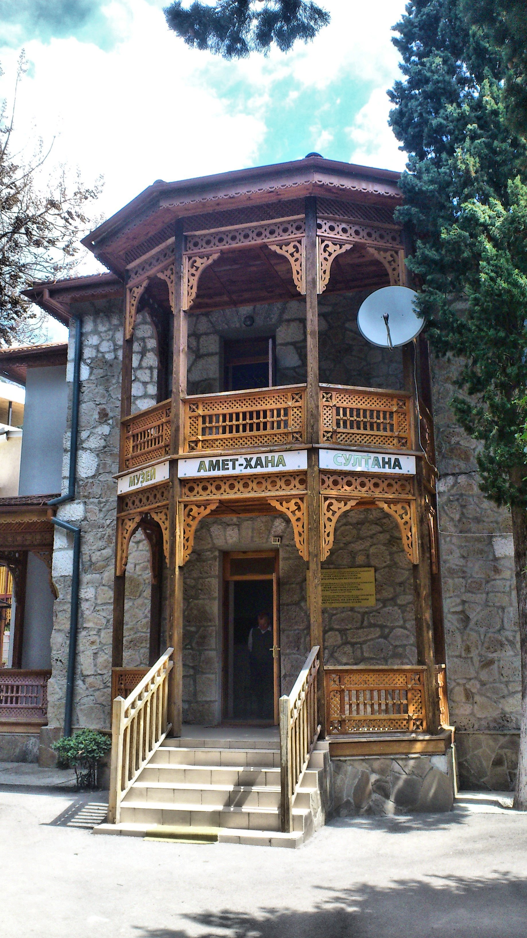 Музей дважды Героя Советского Союза Амет-Хана Султана